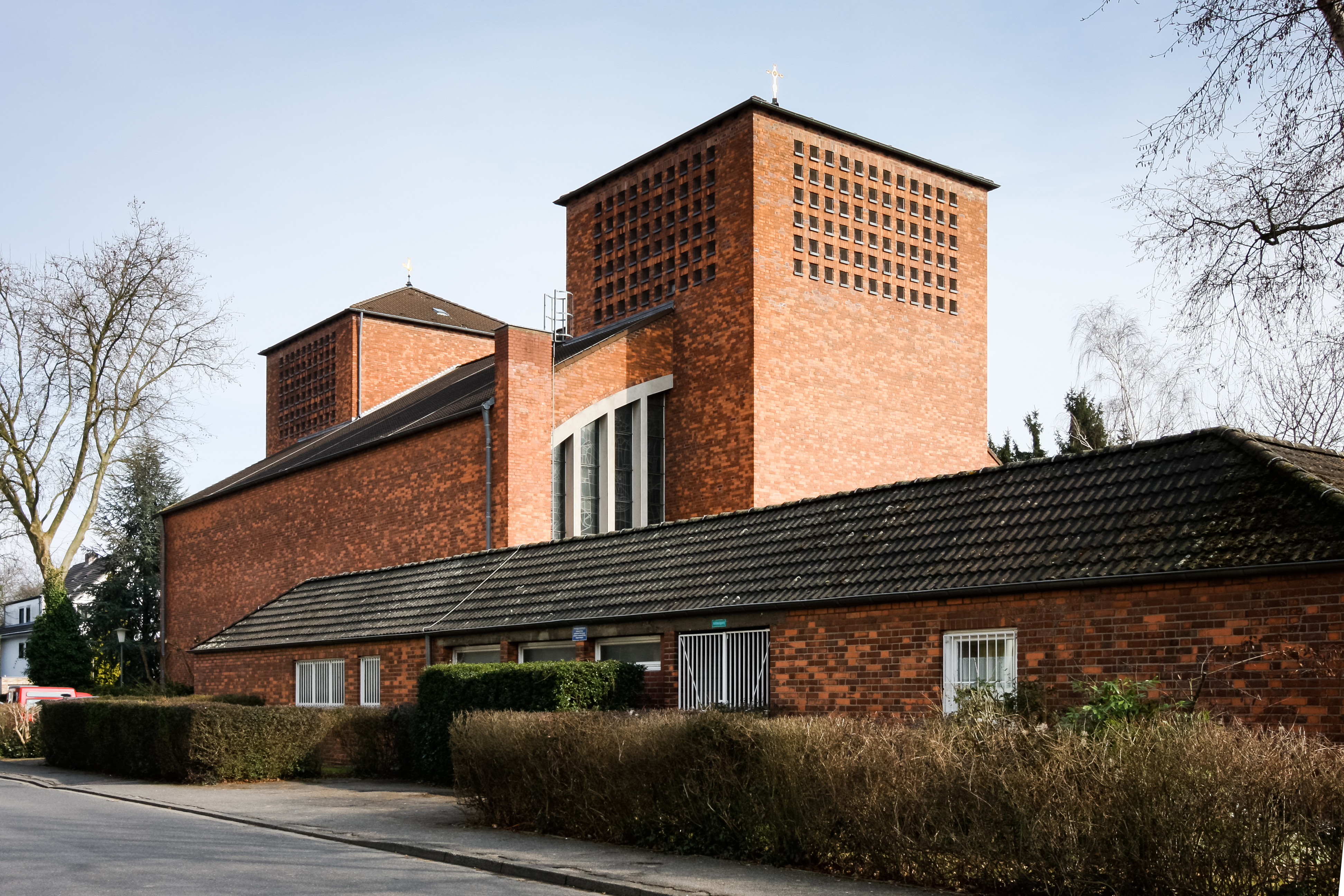 Kirche St. Joseph in Köln-Rodenkirchen. Architekt: Dominikus und Gottfried Böhm